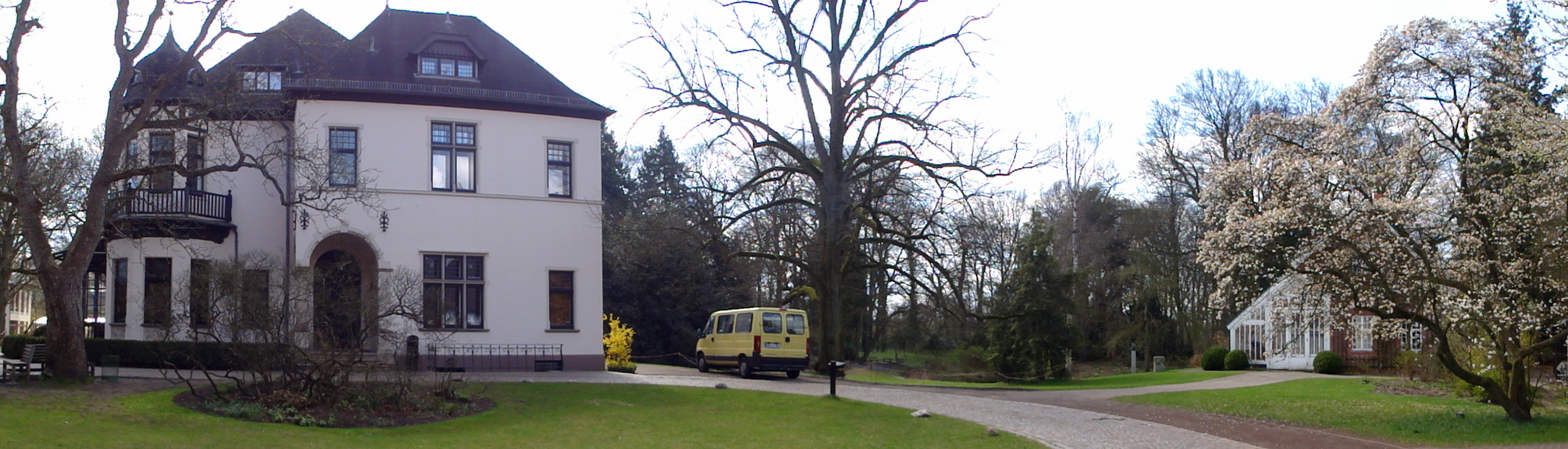 Landsitz Hasse, Landgut Wichelhausen, Landgut Iken, Tobias-Schule in Bremen, Rockwinkeler Landstraße 41Die Gesamtanlage ist ein geschütztes Kulturdenkmal in der Freien Hansestadt Bremen, mit der Nr. 0934,T beim Landesamt für Denkmalpflege registriert.